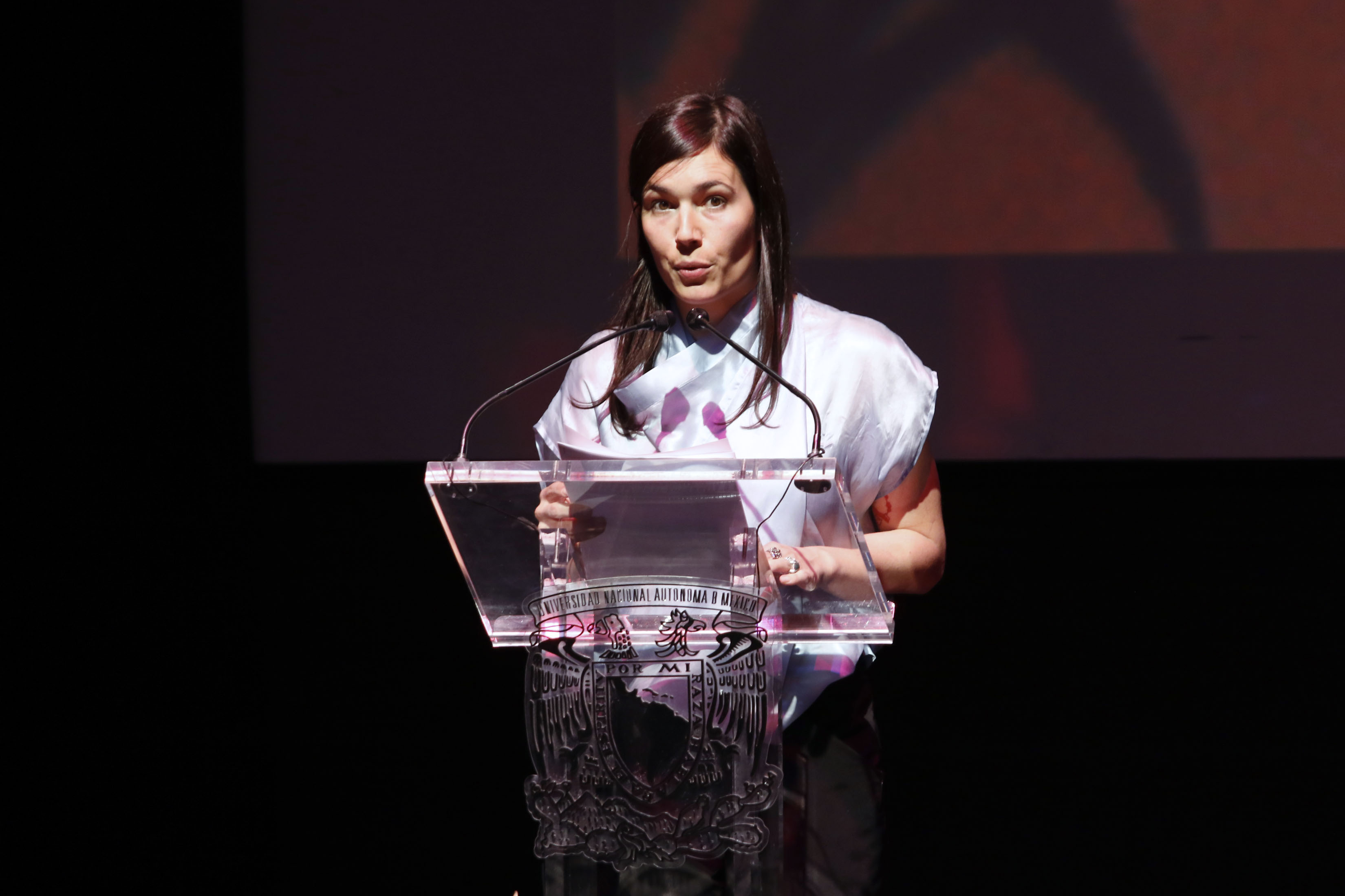 Miércoles 22 de febrero de 2017. En la Sala Miguel Covarrubias, del Centro Cultura Universitario, al sur de la Ciudad de México, se inauguró el 7º Festival Internacional de Cine de la UNAM (FICUNAM), a cargo de Rector de la UNAM Enrique Graue Wiecher; la directora del festival Eva Sangiorgi; el coordinador de Difusión Cultura de la máxima casa de estudios Jorge Volpi y el director del Imcine Jorge Sánchez Sosa. Fotografía: Milton Martínez / Secretaría de Cultura CDMX